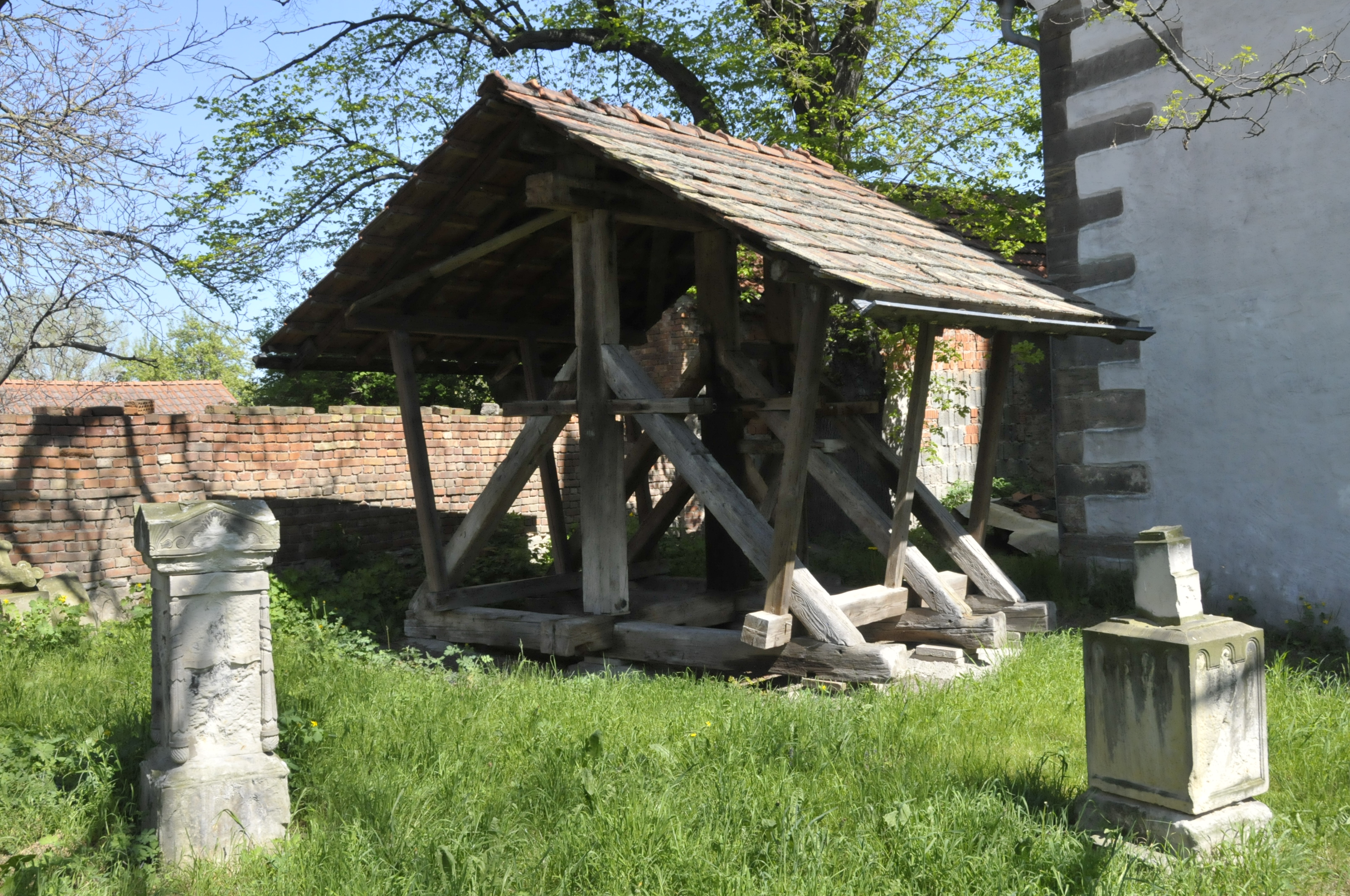 Kleinmölsen, Glockenstuhl im Kirchhof